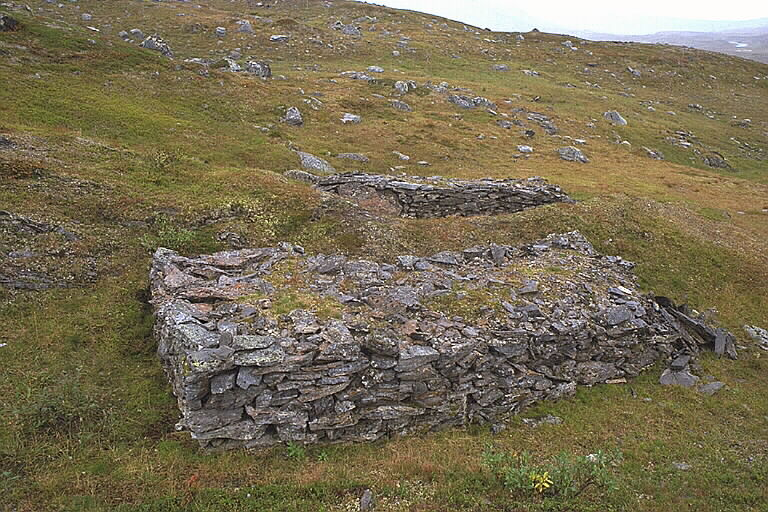 RAÄ-nummer Jokkmokk 1296:1(1). Lämningar efter silverbrytning, husgrunder. Laponia Motiv: Jokkmokk 1296:1(1) Nyckelord: Riksintressen, Världsarv Kategori: Husgrund RAÄ-nummer Jokkmokk 1296:1(1). Lämningar efter silverbrytning, husgrunder. Laponia. Jokkmokk 1296:1(1).